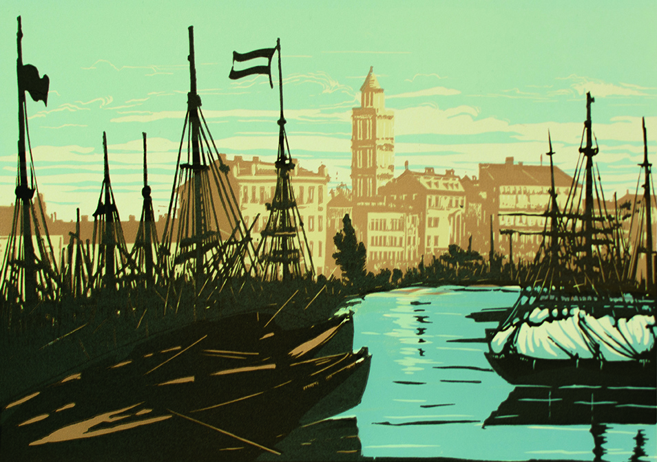 Jaroslav Dobrovolský: Split – z cyklu Na modrém Jadranu, barevný dřevoryt, 1933